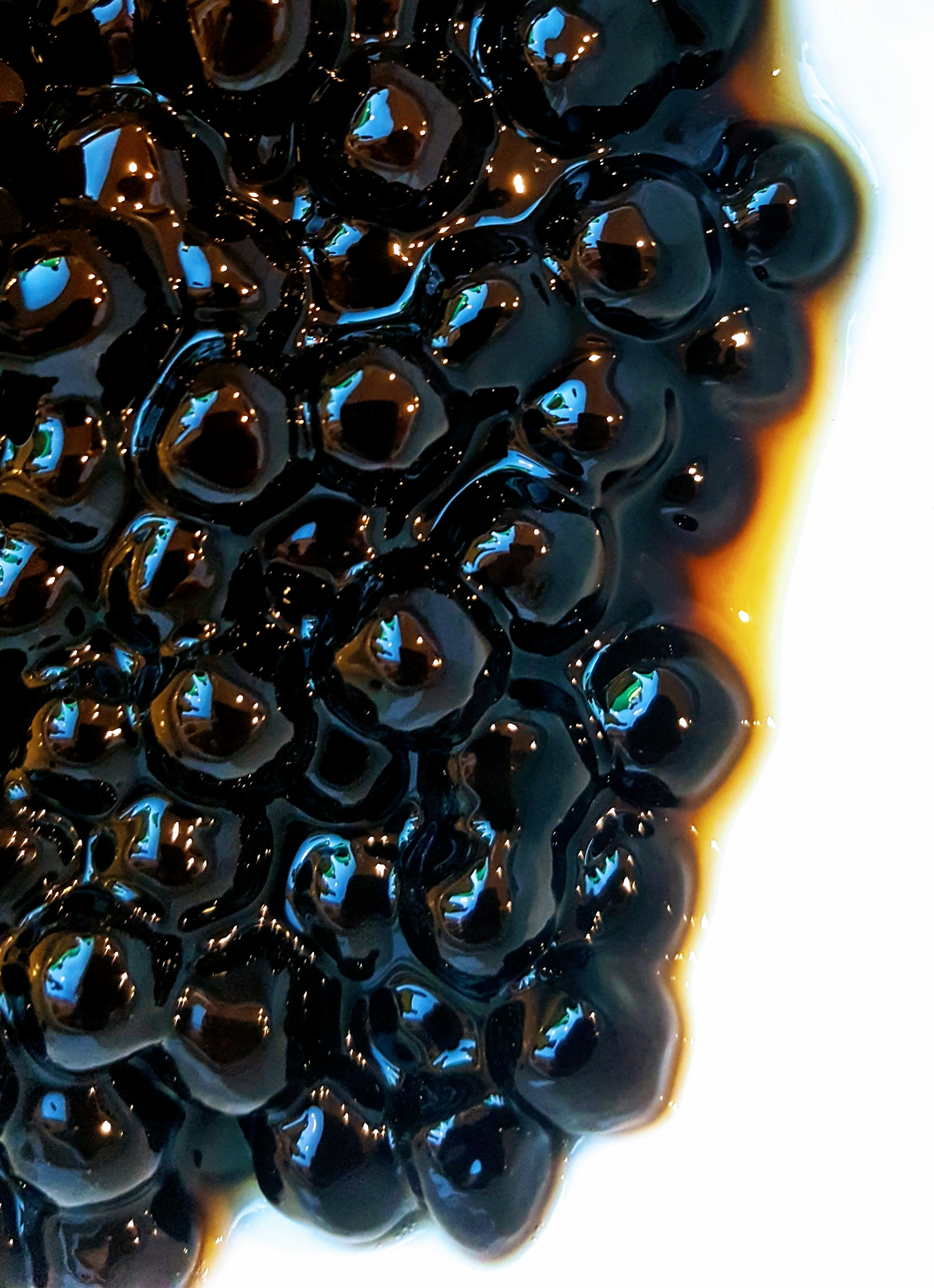 Tapioca, aka boba